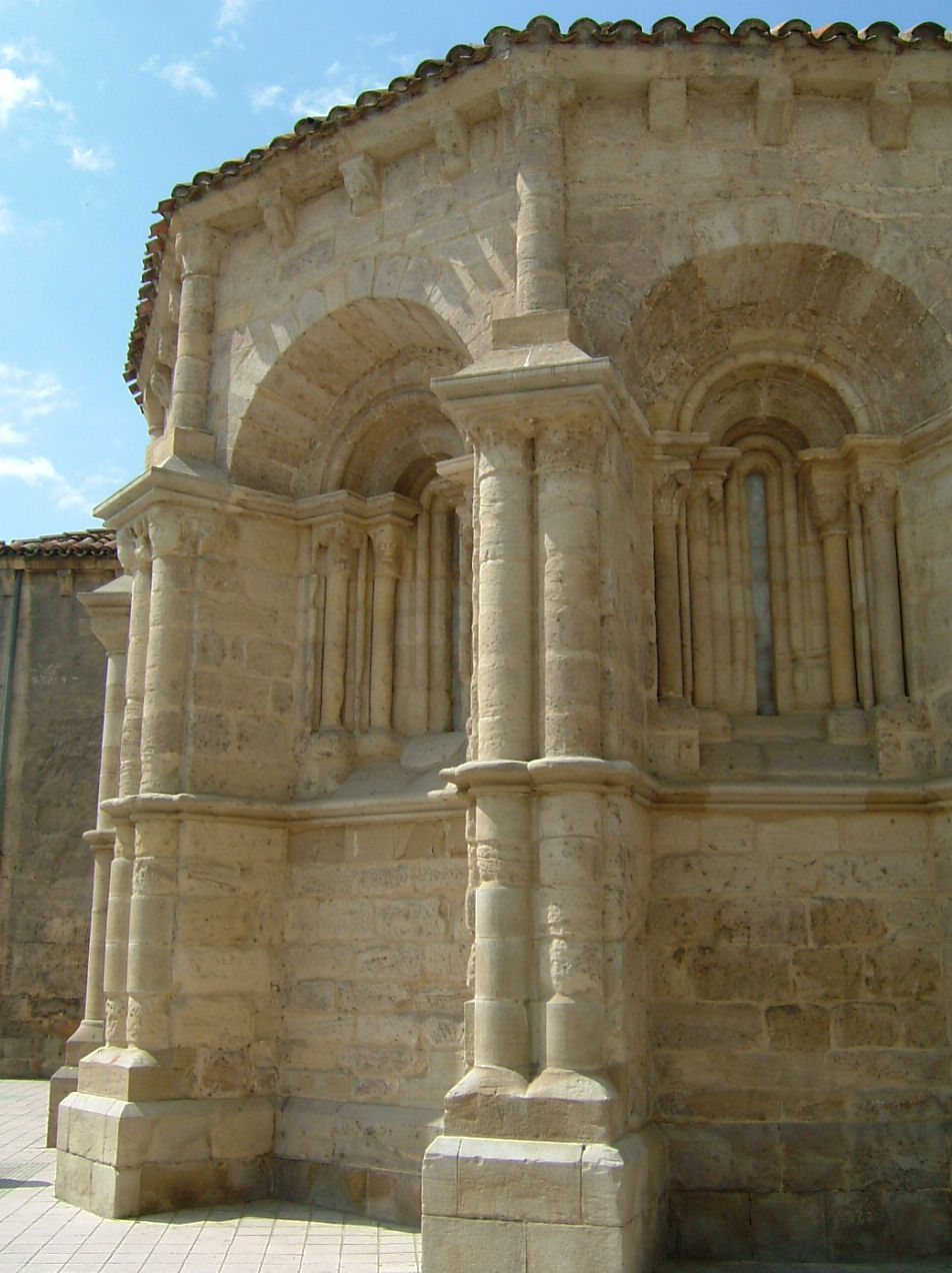 Detalle del ábside de la iglesia del Espíritu Santo de Miranda de Ebro (España)